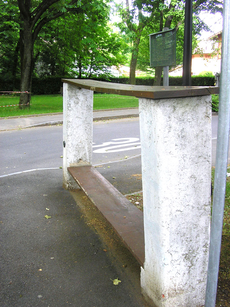 Banc public à étage, du XVIIIème siècle, Rondeau des Bougeries, commune de Chêne-Bougeries, Genève. Le plateau supérieur permettait aux paysans venant vendre leurs marchandises aux marchés de Genève d'y déposer leur paniers pendant un temps de repos.